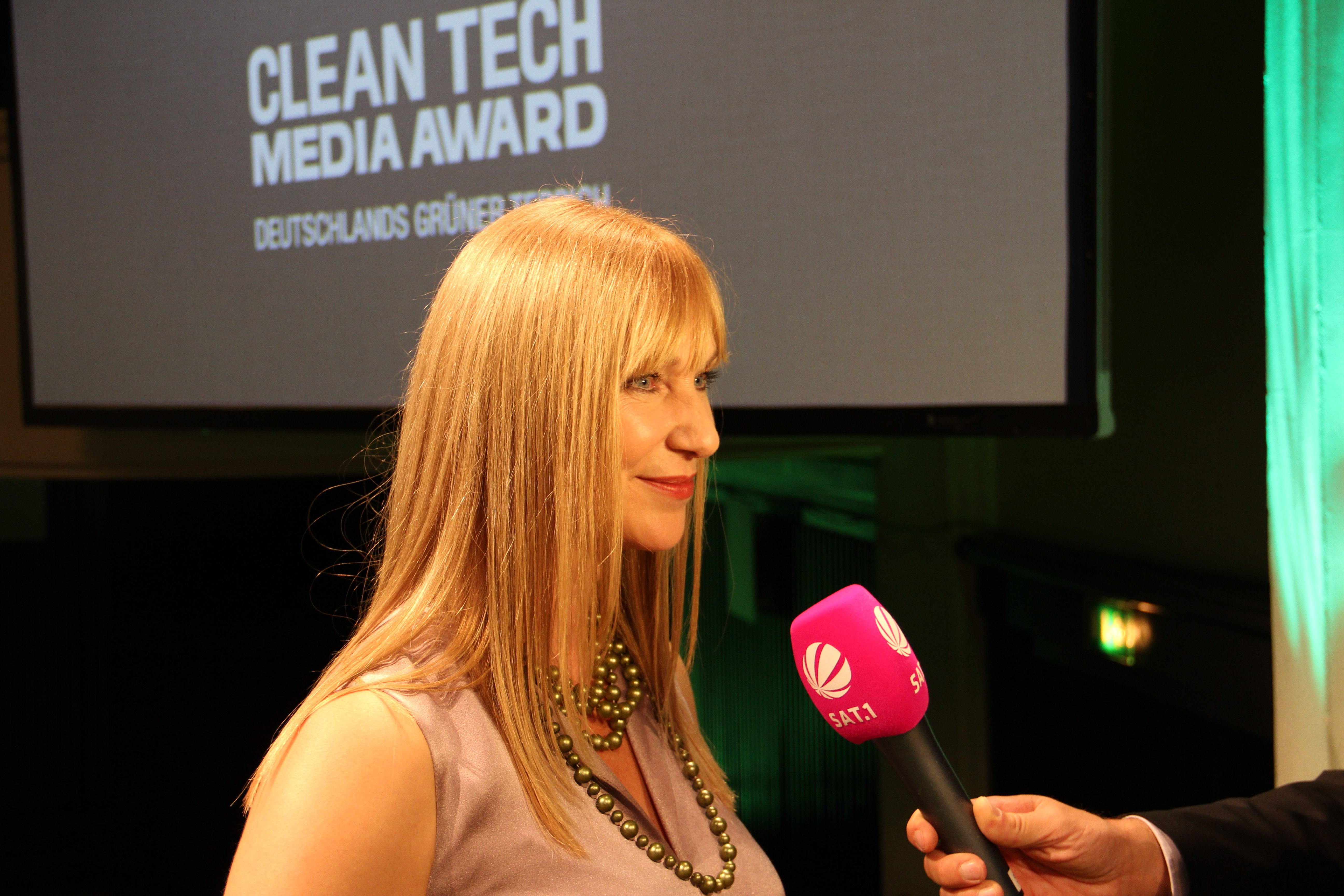 Schauspielerin Sabine Kaack, Jurorin des Clean Tech Media Awards 2011